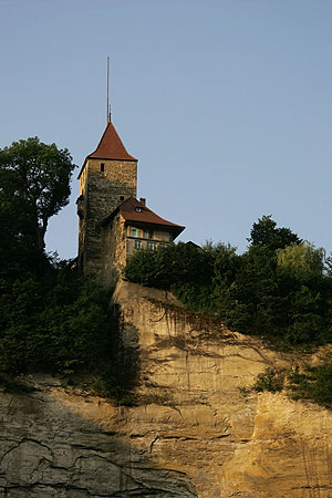 Fribourg / Freiburg: Porte de Bourguillon